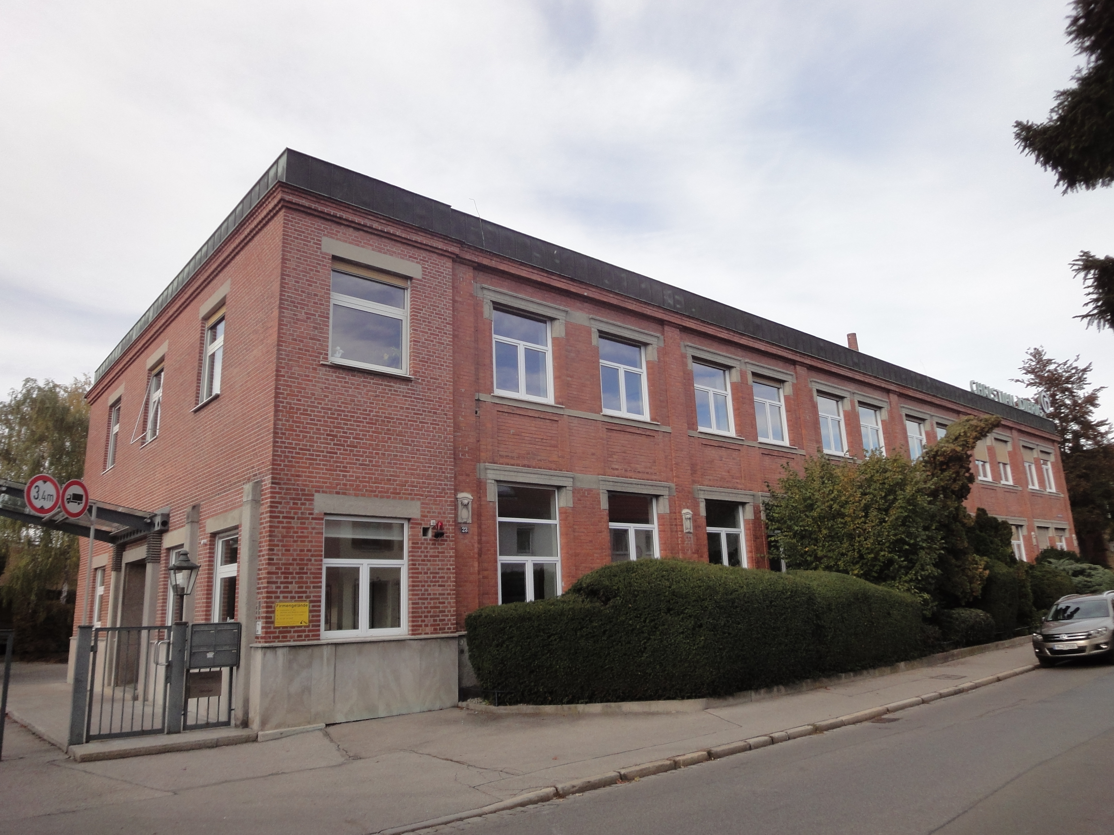 Verwaltungsbau der ehem. Mechanischen Weberei am Mühlbach, Augsburg-Pfersee